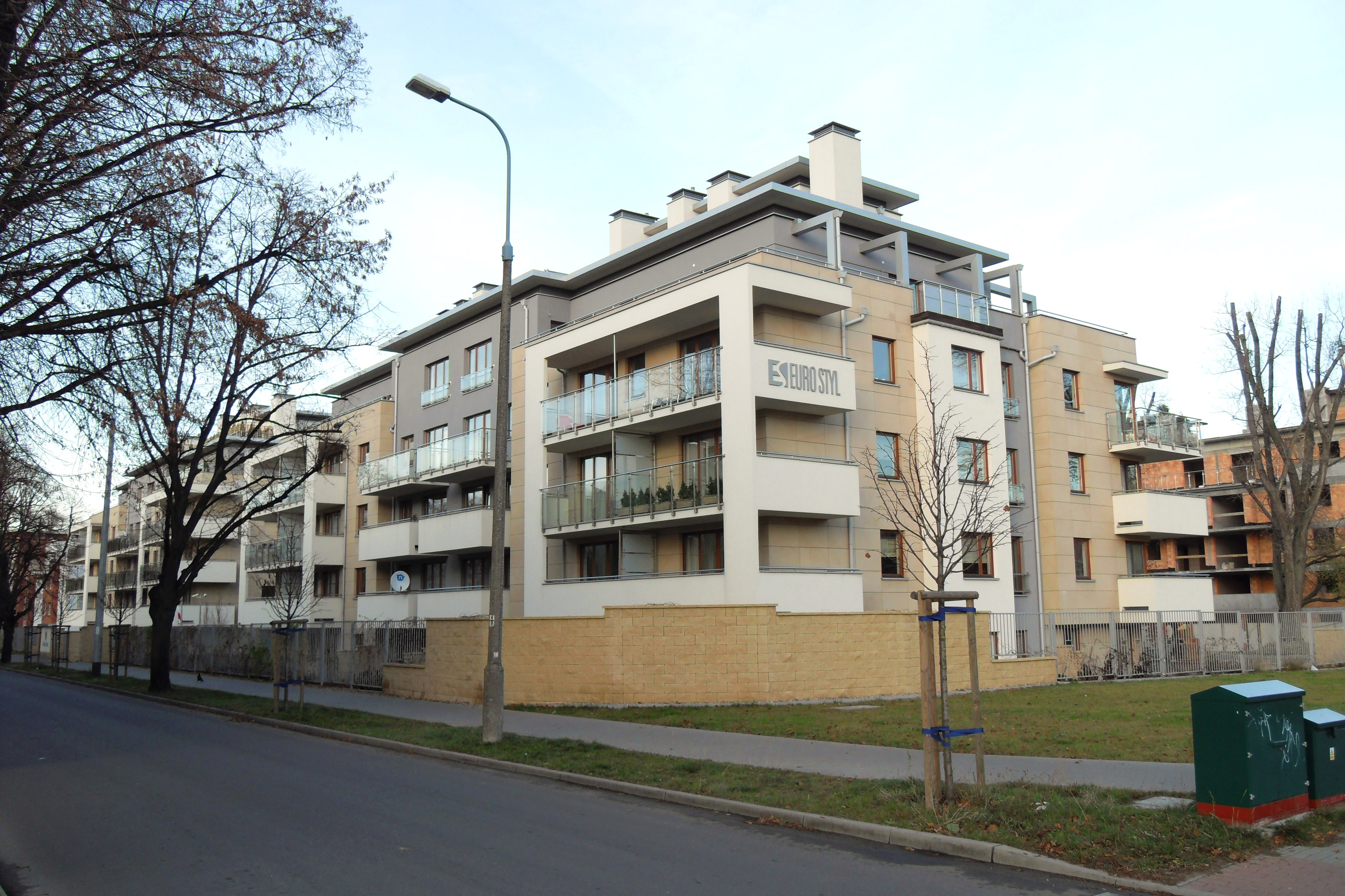 Gdańsk Przymorze Małe. Osiedle Oliwa Park, budynki przy ul. Krzywoustego, na pierwszym planie ul. Poznańska.